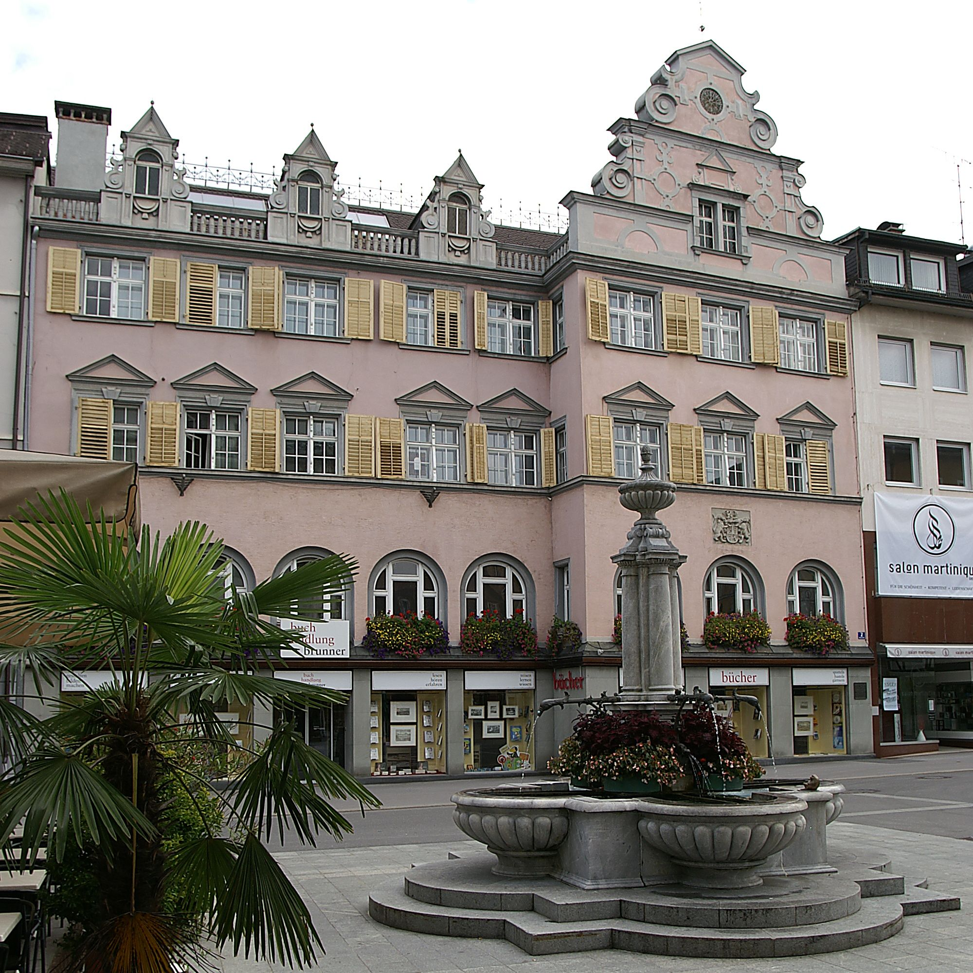 Brunnen am Leutbühel (Platz) vor dem Gebäude Rathausstrasse 2